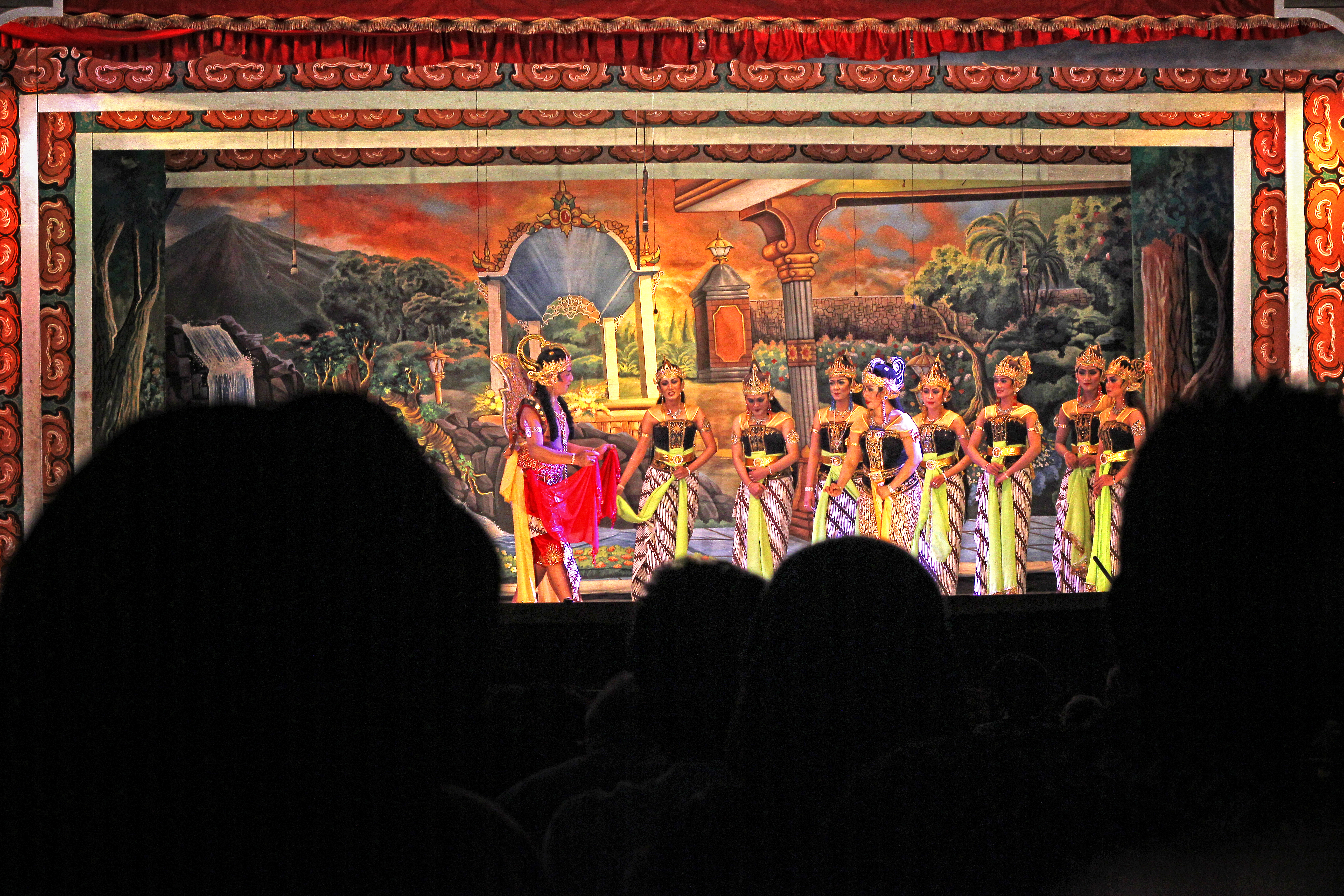 pementasan rutin W.O Ngesti Pandowo